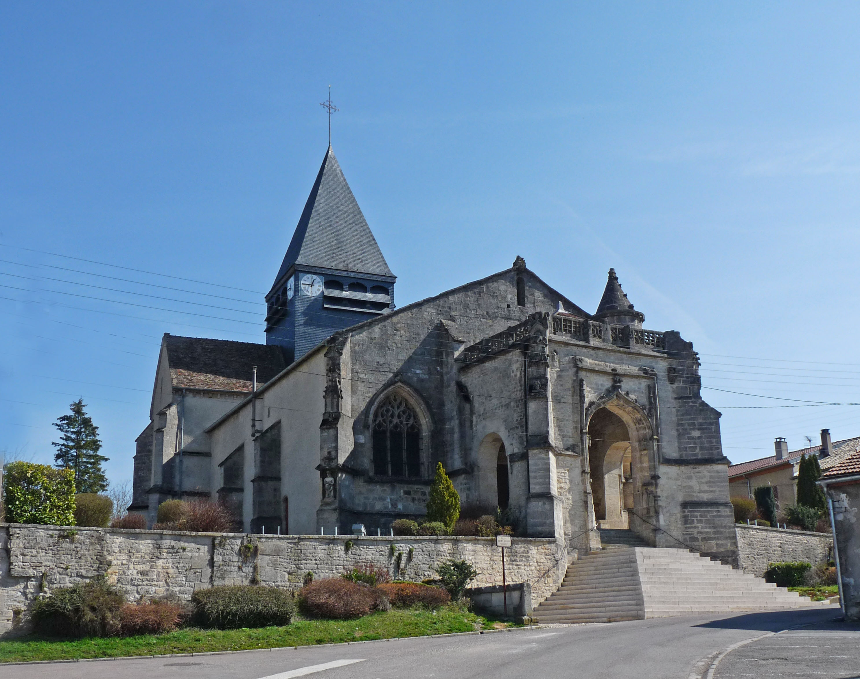 Eglise Saint-Aignan de Poissons (Haute-Marne)